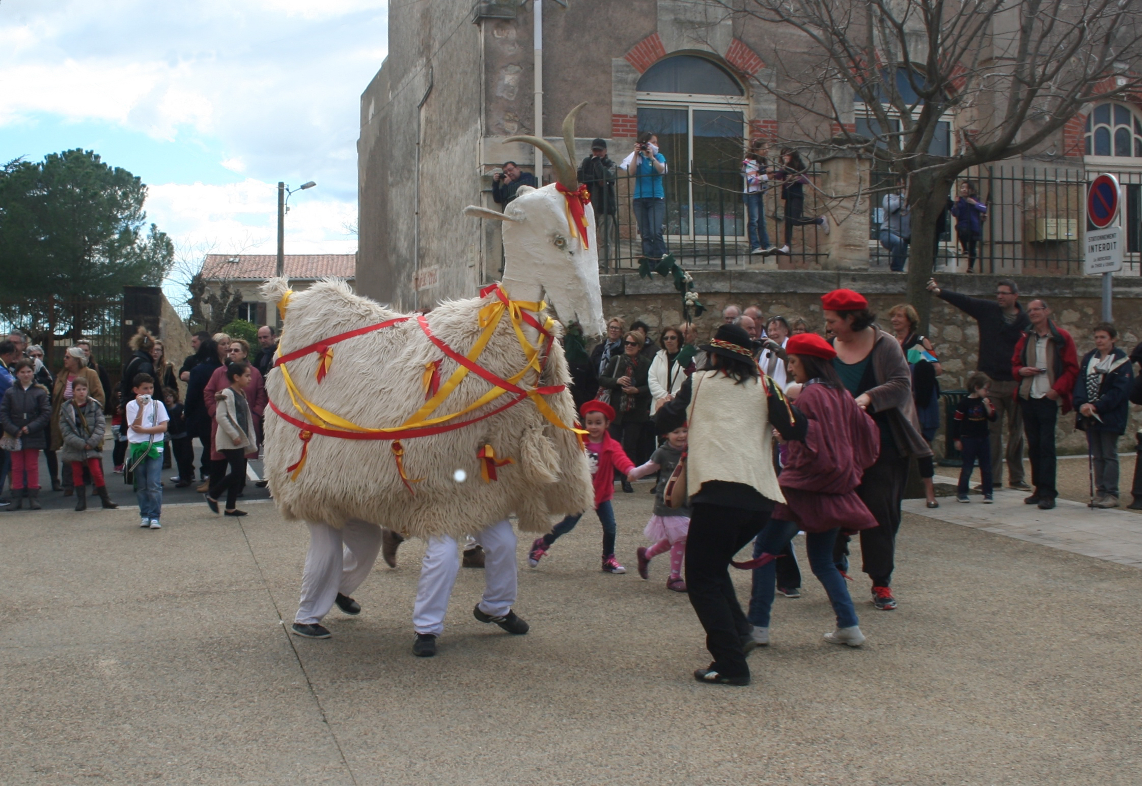 Montagnac (Hérault) - la Cabreta (la petite chèvre), animal totémique, de sortie à Castelnau-de-Guers